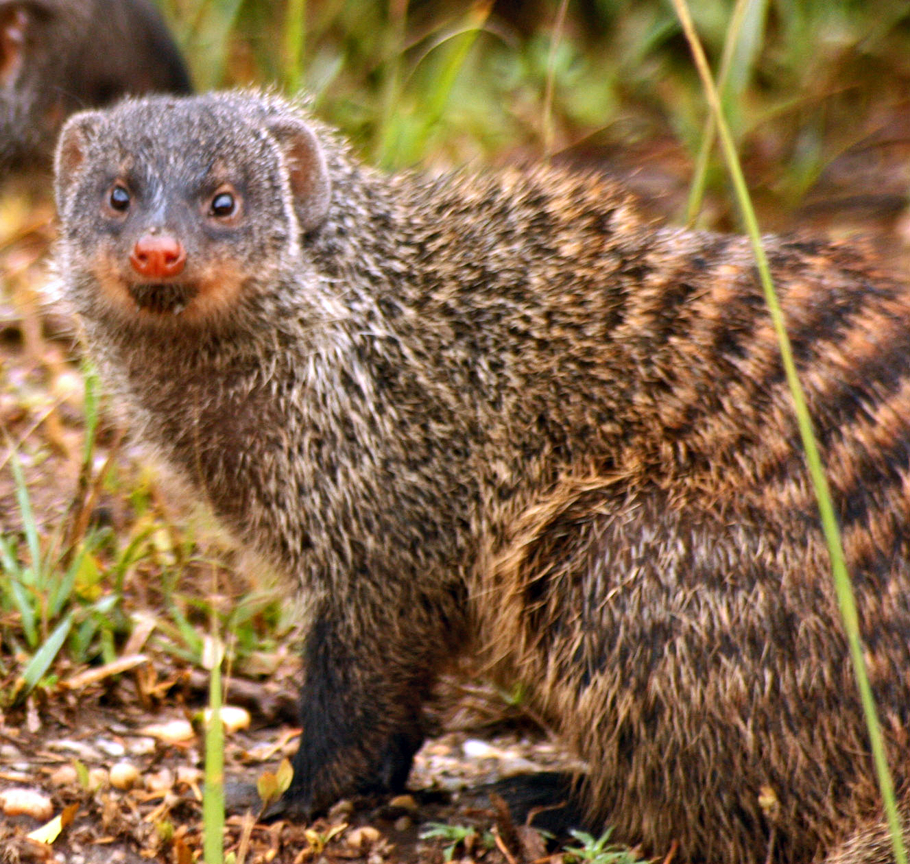 Banded Mongoose (Mungos mungo), UgandaMongoose